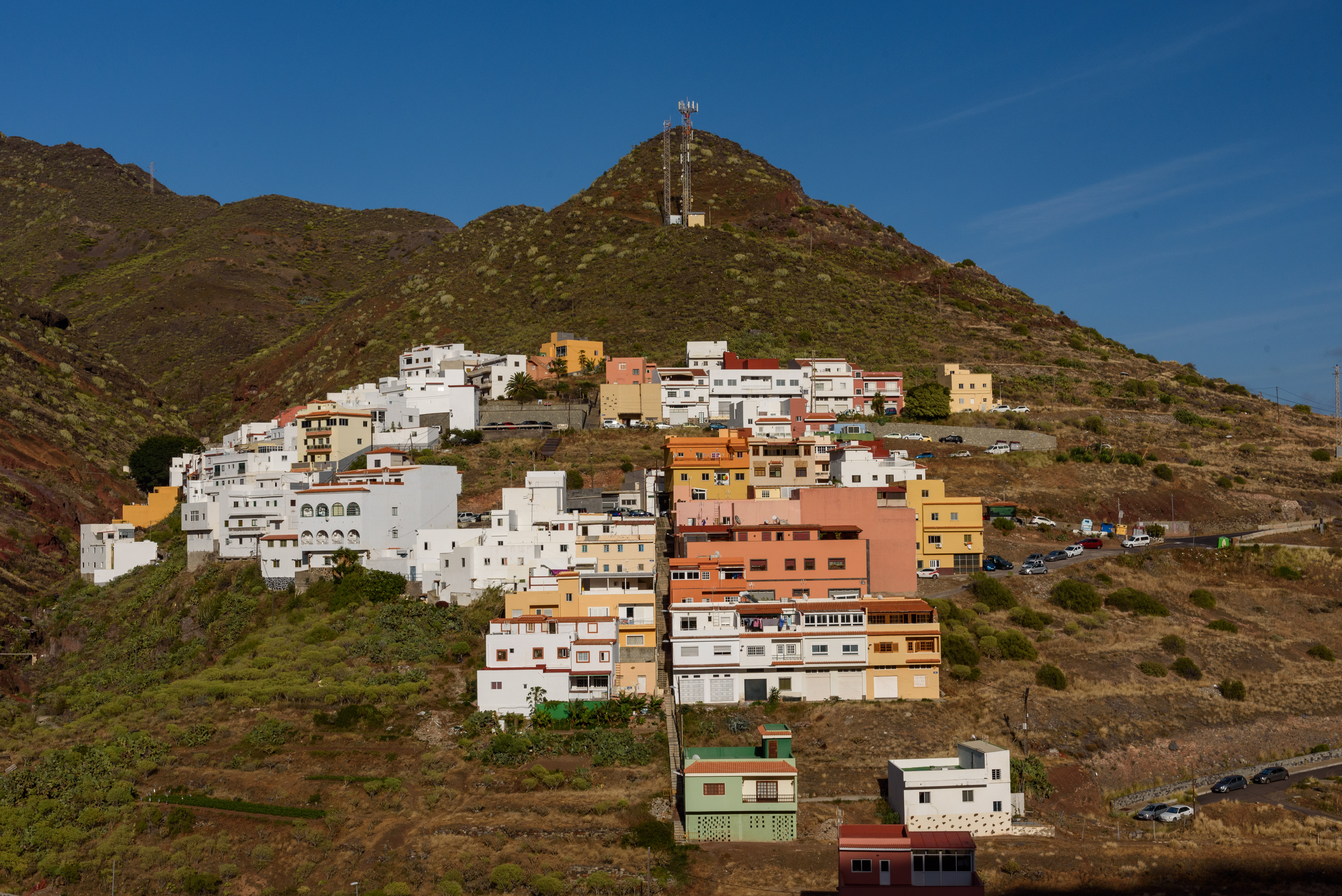 Vista del Barrio del Suculum (Santa Cruz de Tenerife) en 2019